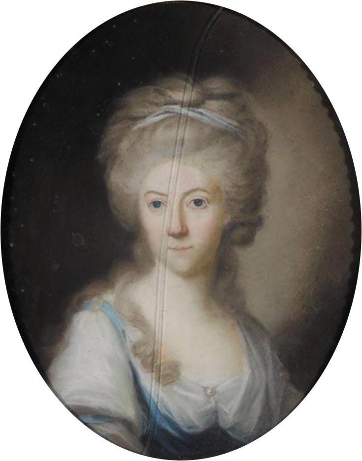 Auguste Dorothea von Braunschweig-Wolfenbüttel (1749-1810), Äbtissin von Gandersheim